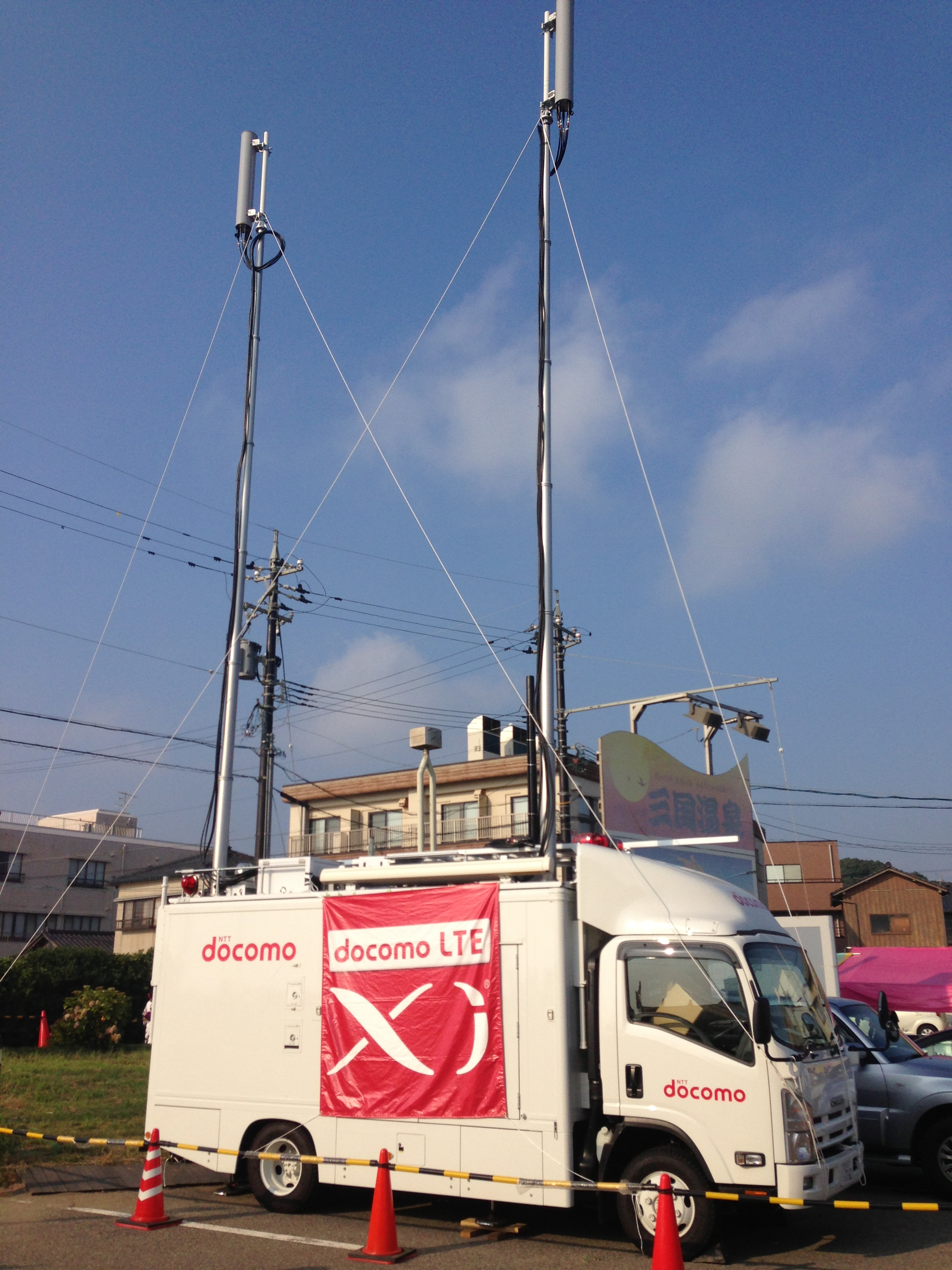 NTTドコモの移動基地局車です。